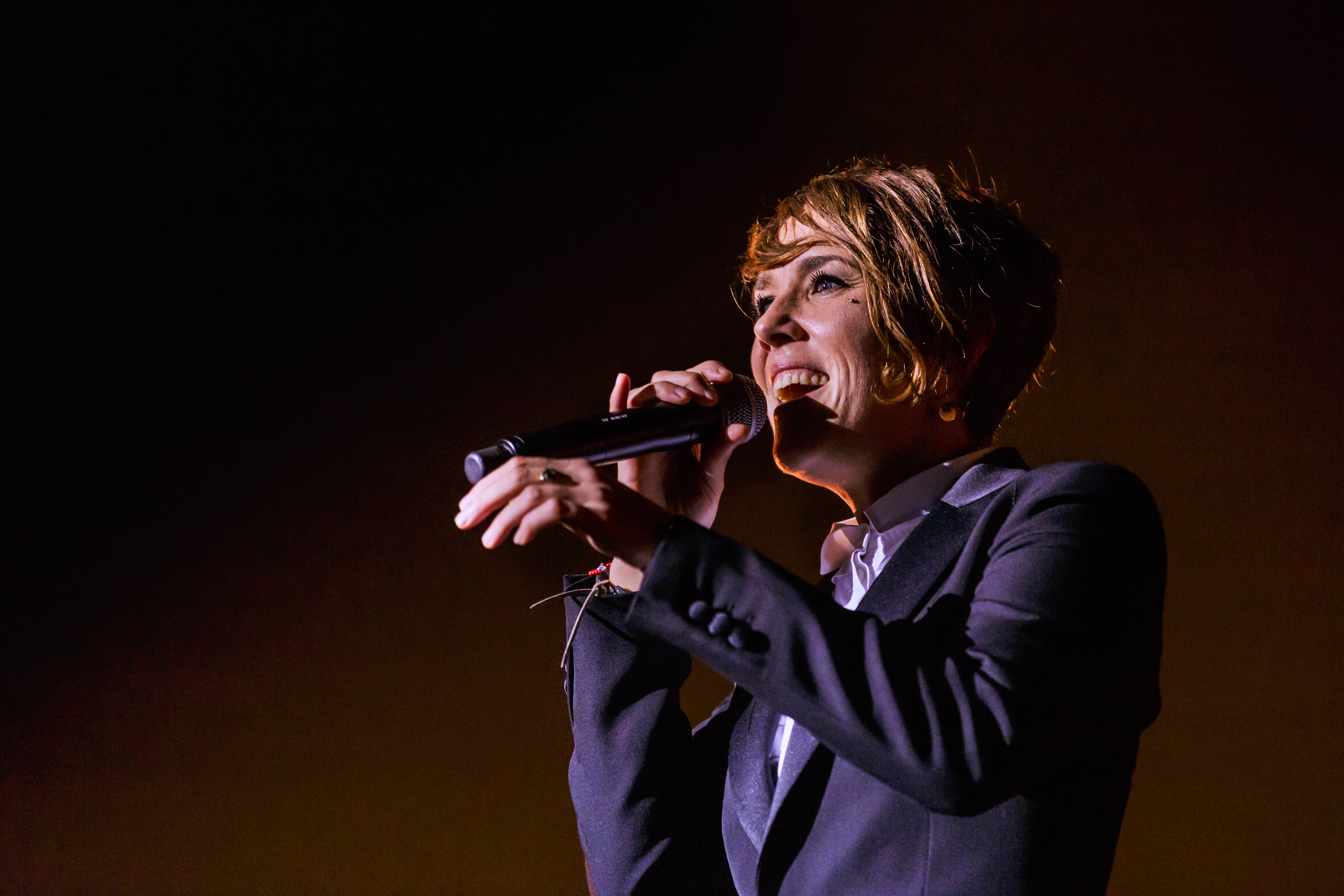 Concert de Zaz à la Brest Arena, organisé par Diogène productions, le 5 novembre 2016.